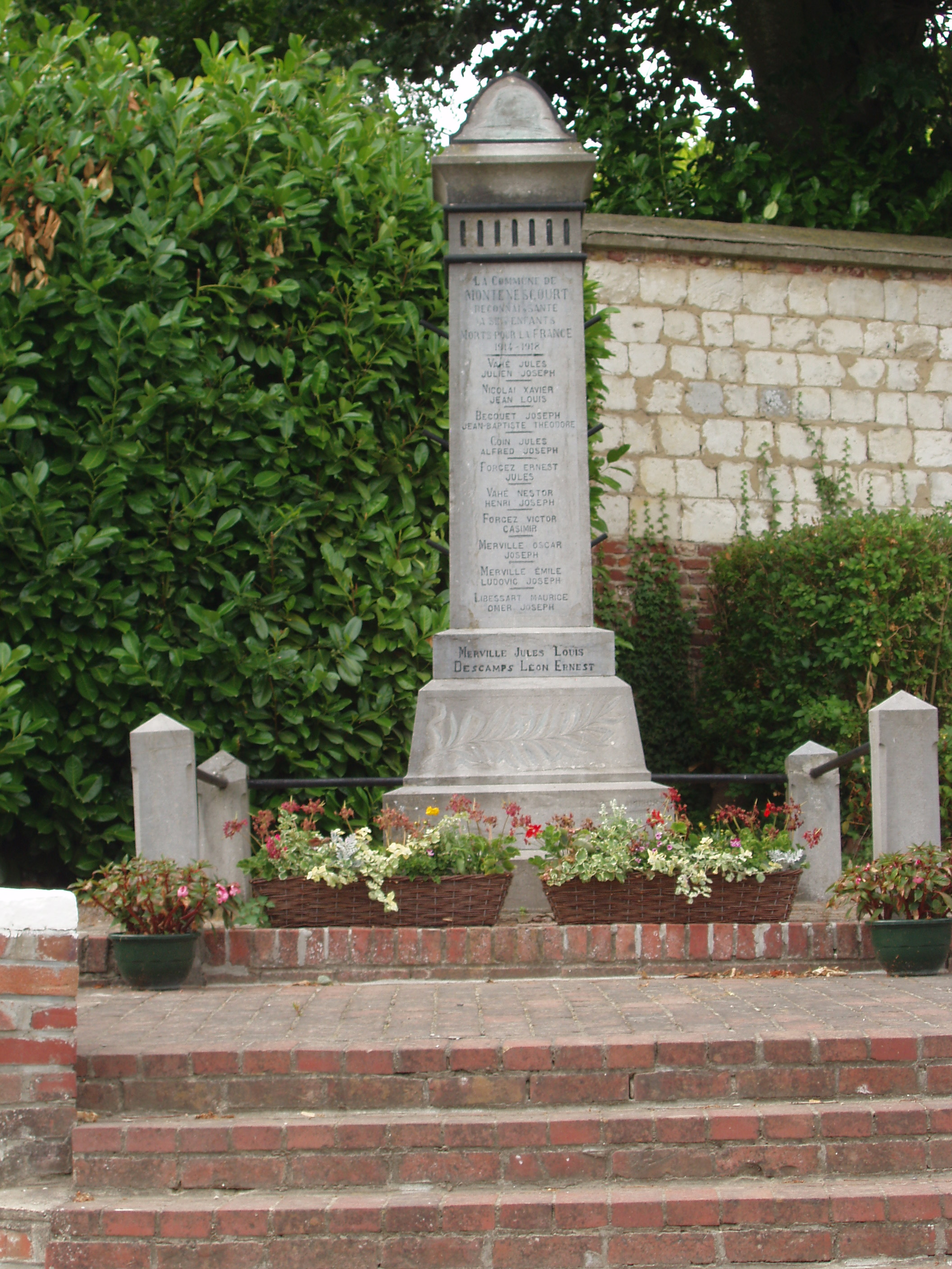 Commune française de Montenescourt dans le département du Pas-de-Calais en France - Monument aux Morts